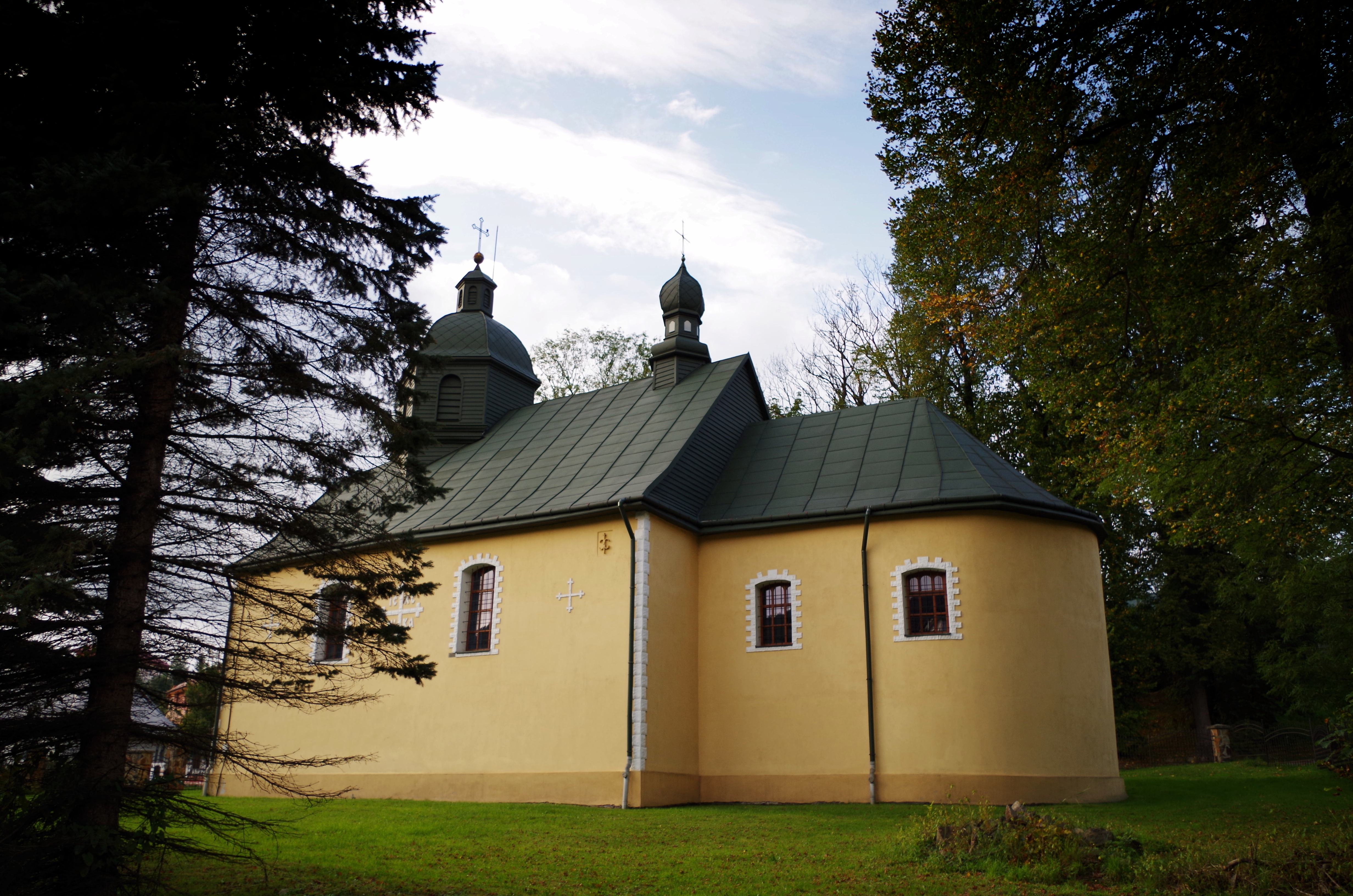 Ustrzyki Dolne, cerkiew gr.-kat. p.w. Zaśnięcia Marii, 1847